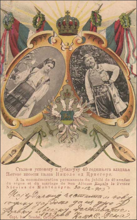 Сталном успоменом к јубилеуму 40 годишњега владања Његове висости књаза Николе од Црнегоре